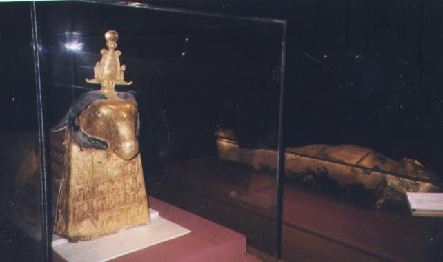 Нубийский музей